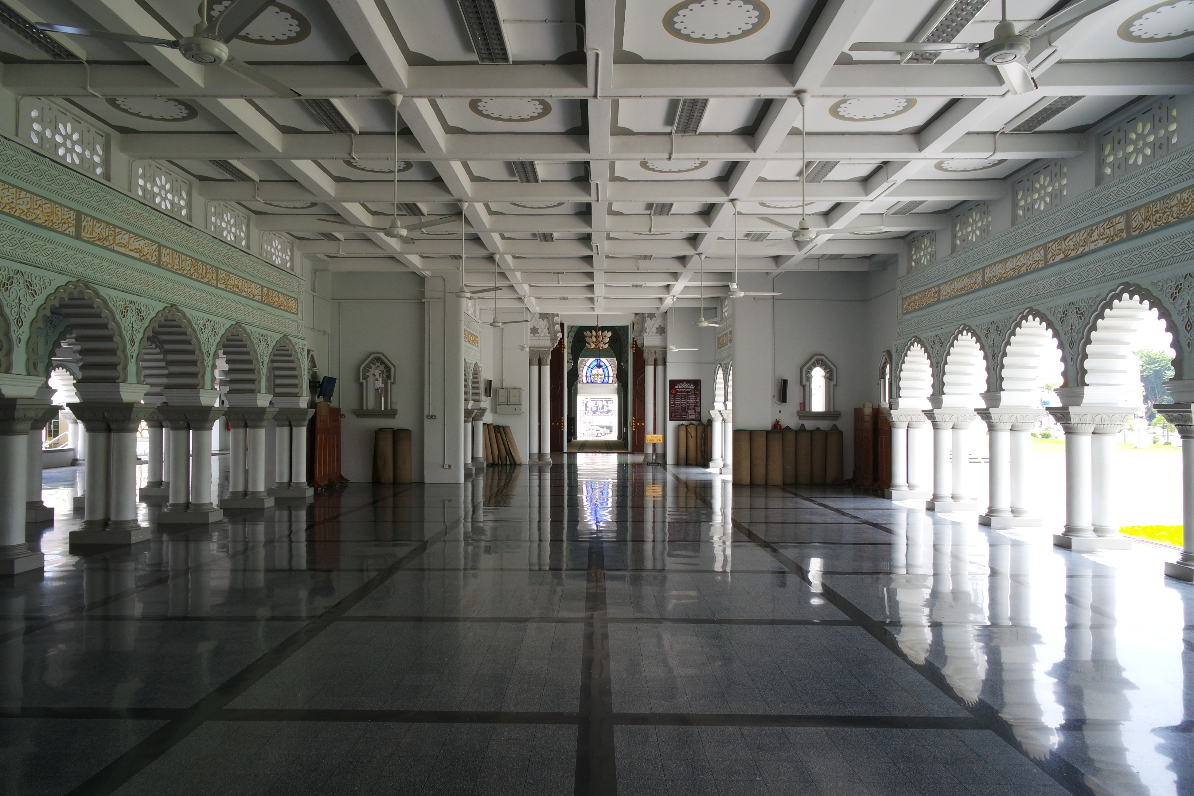 Эрзянь: Zahir Mosque